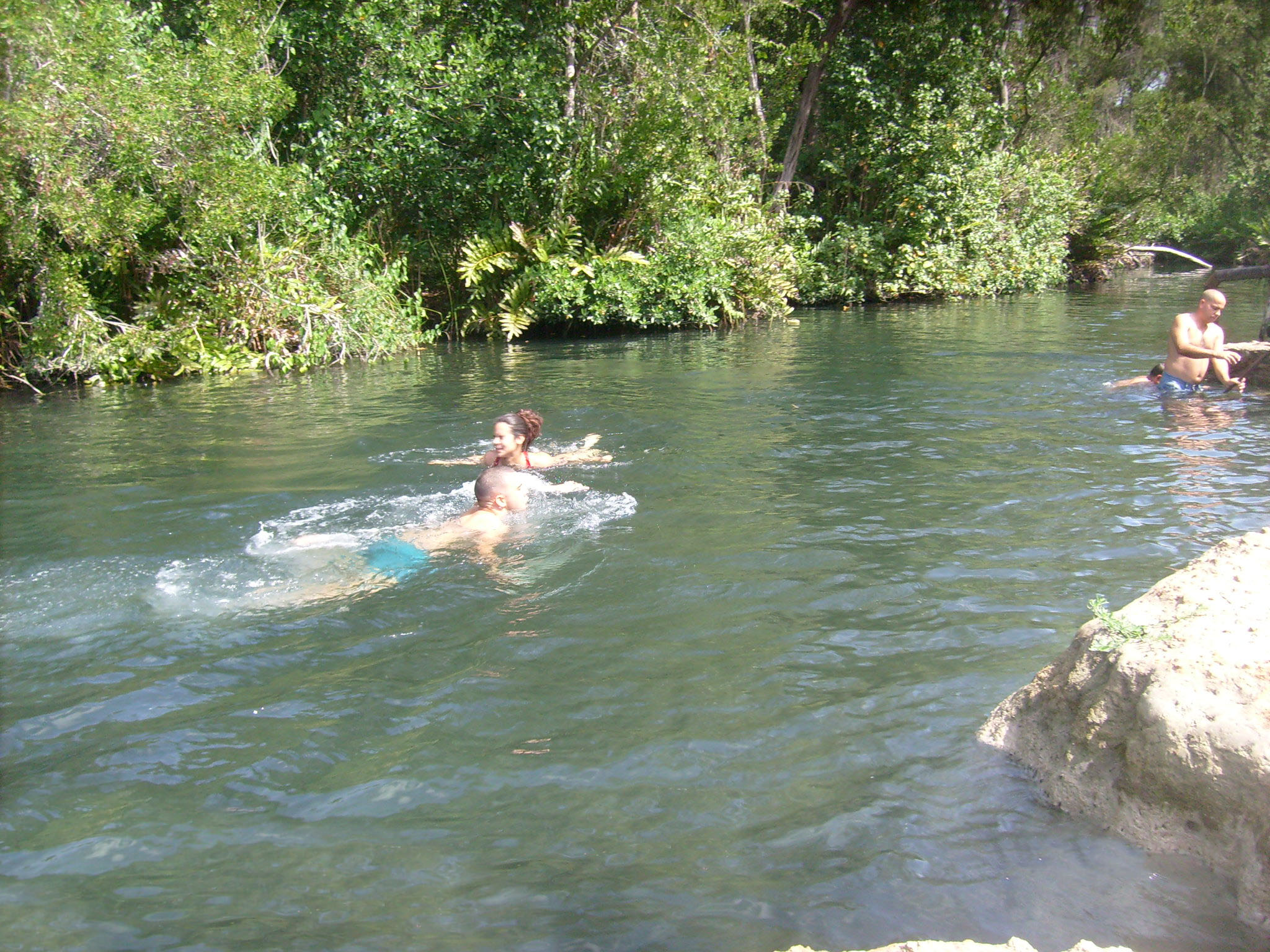 Bañistas en lo que es la entrada del río a la playa conocido como "La Palmita"